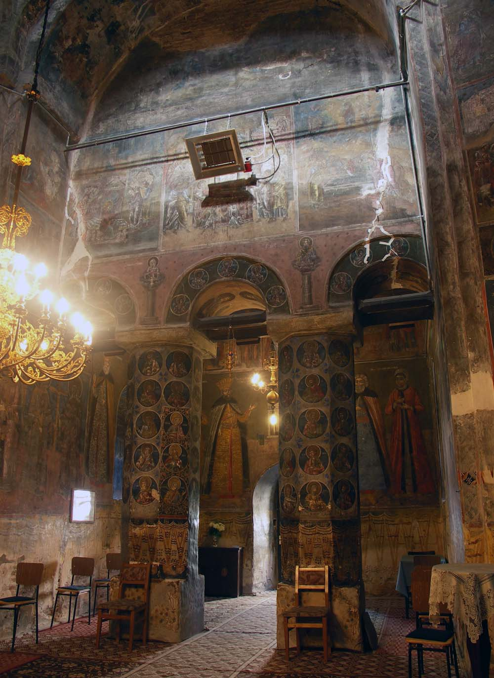 Mănăstirea Gura Motrului. Vedere din navă spre pronaos, stâlpii despărţitori.